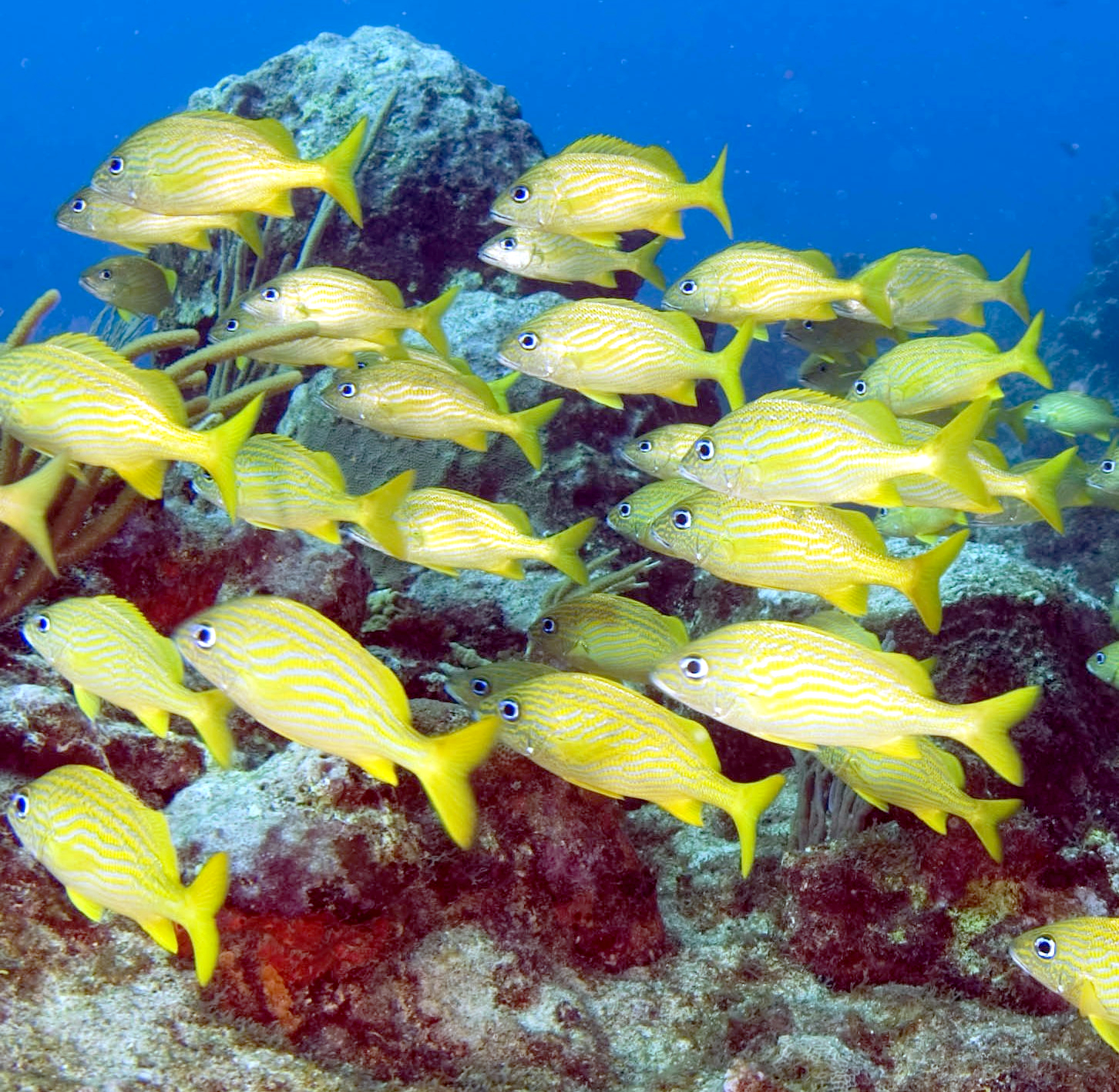 Mola d´Haemulon flavolineatum.